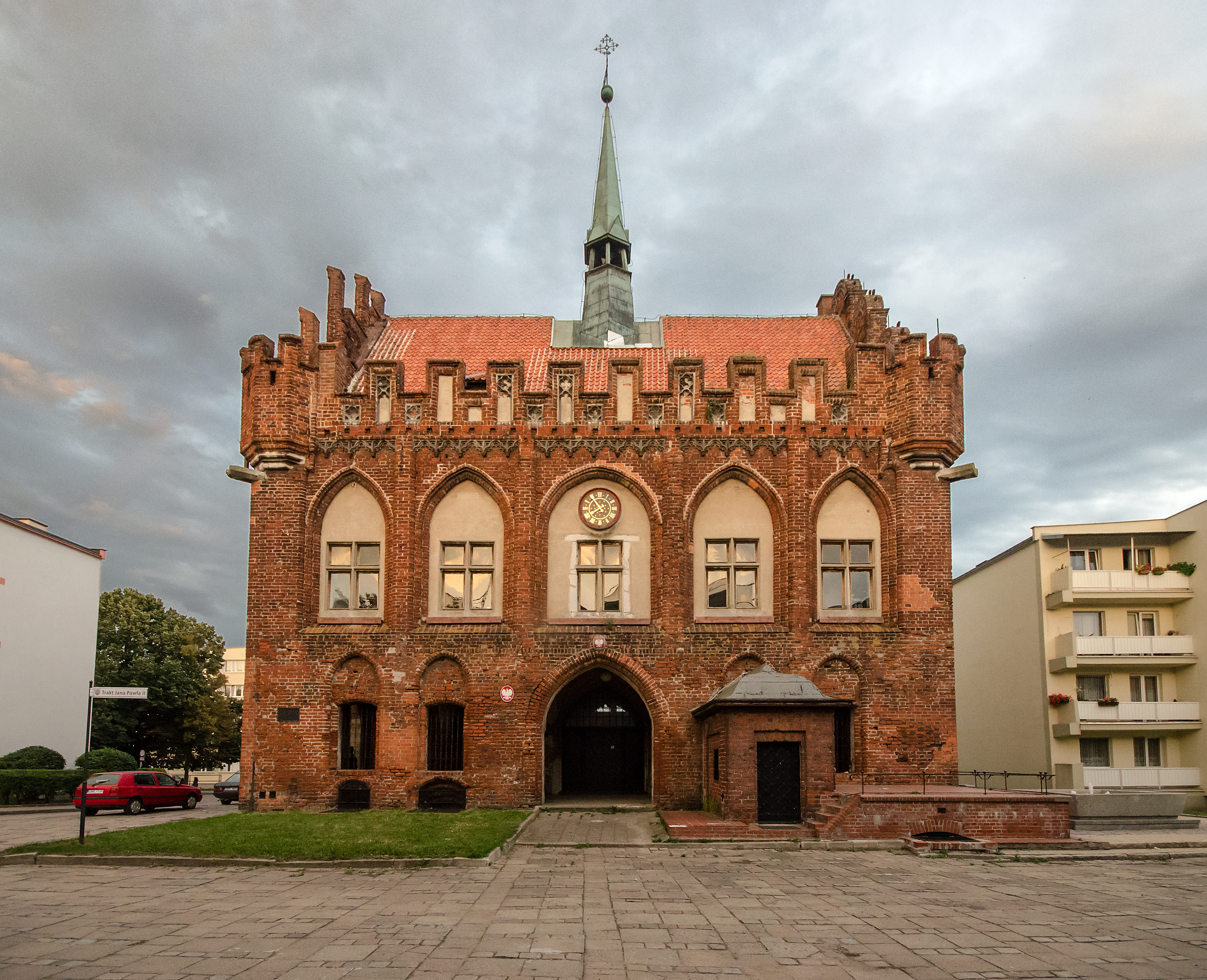 Malbork, ratusz, 2 poł. XIV-XIX